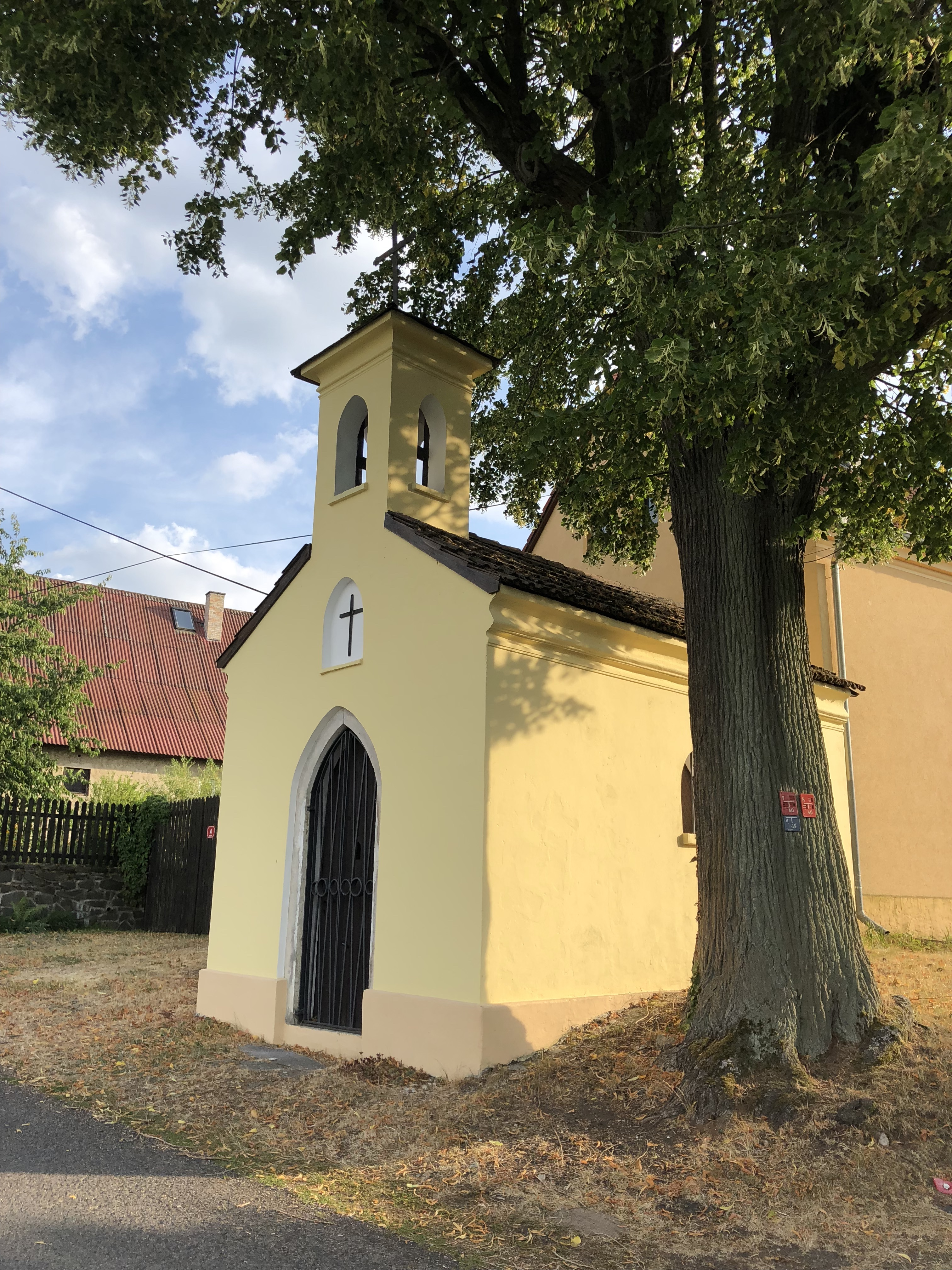 Kaple v Doubravicích ze silnice